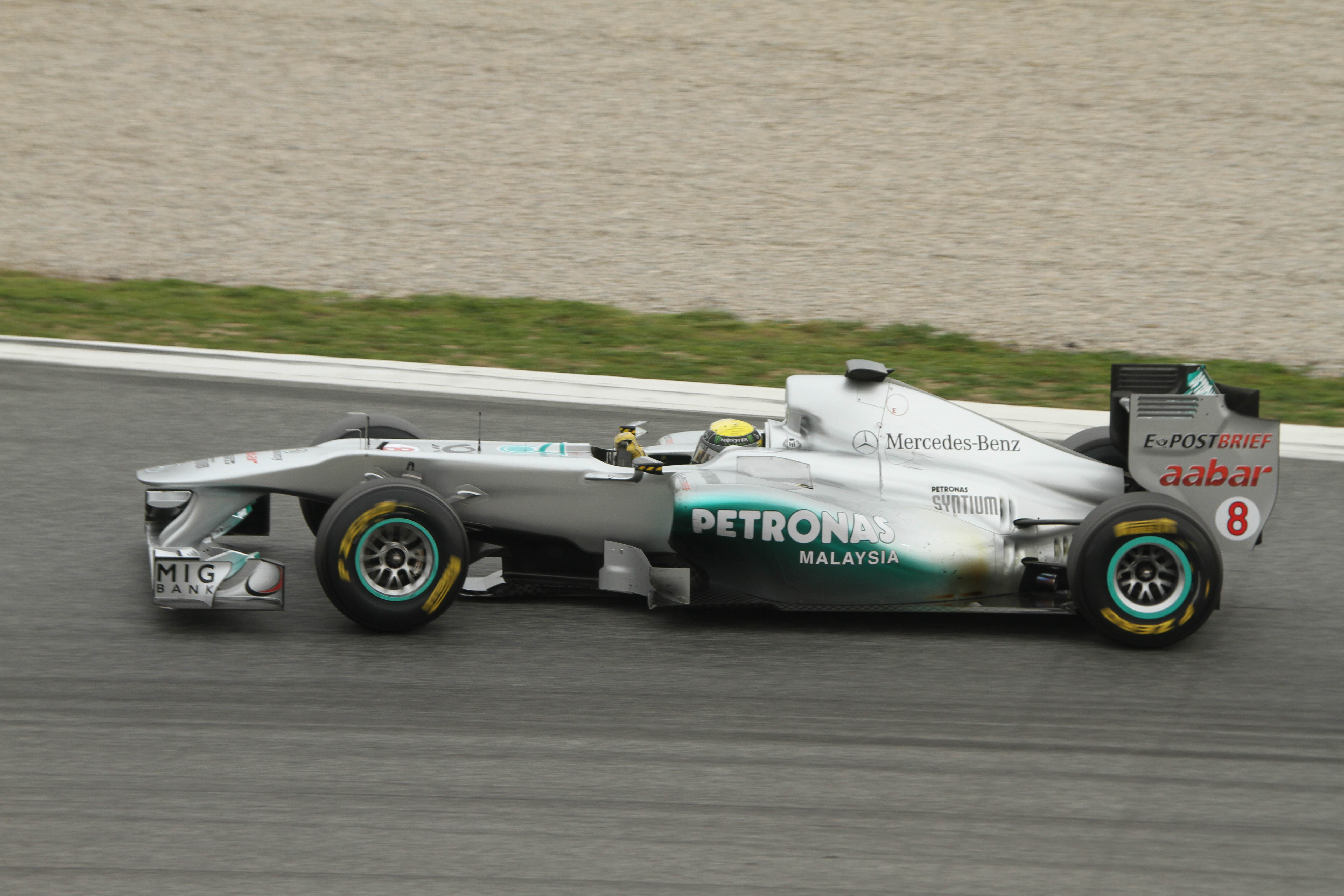 Rosberg